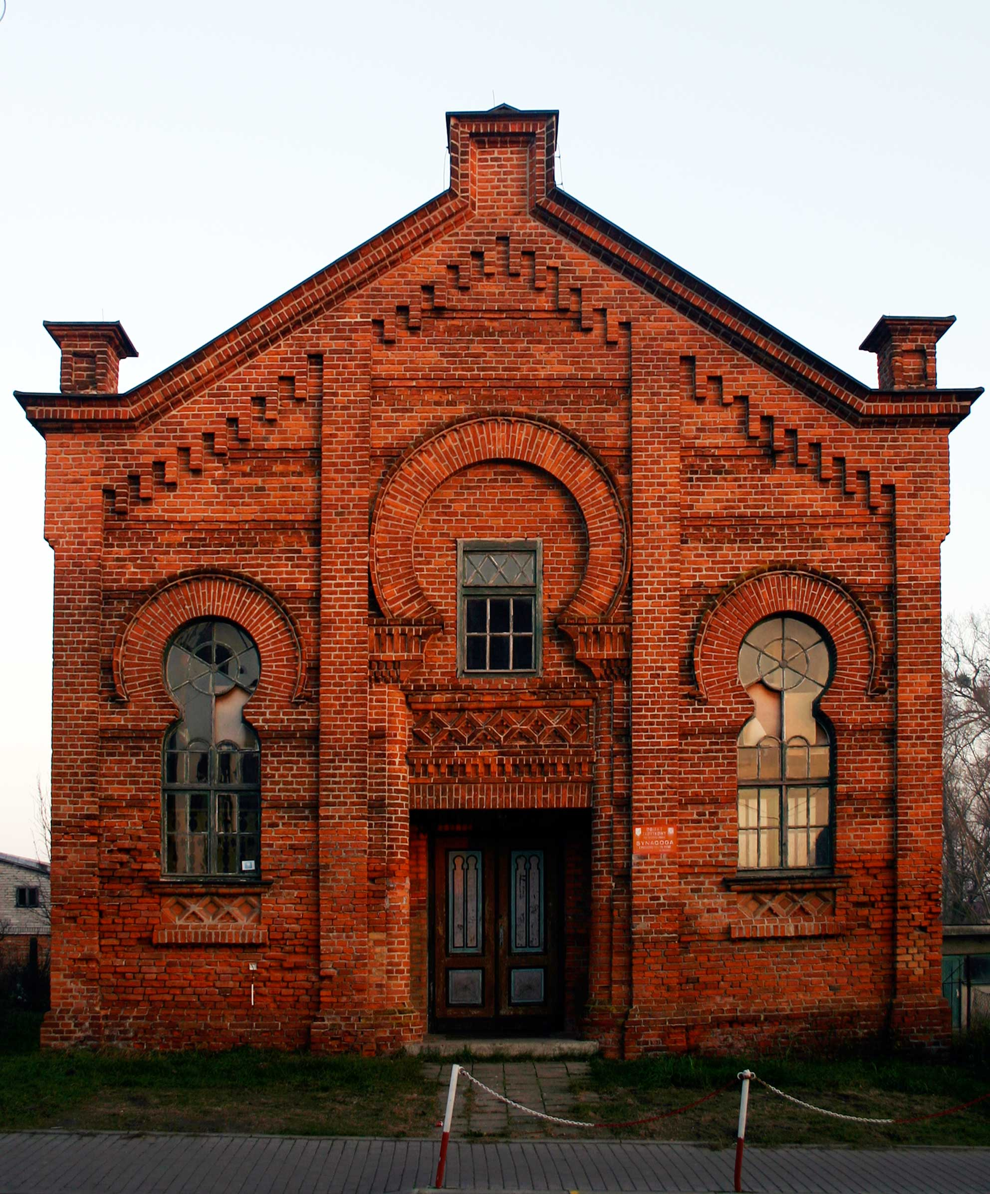 Synagogue in Radzanów/Synagoga w Radzanowie